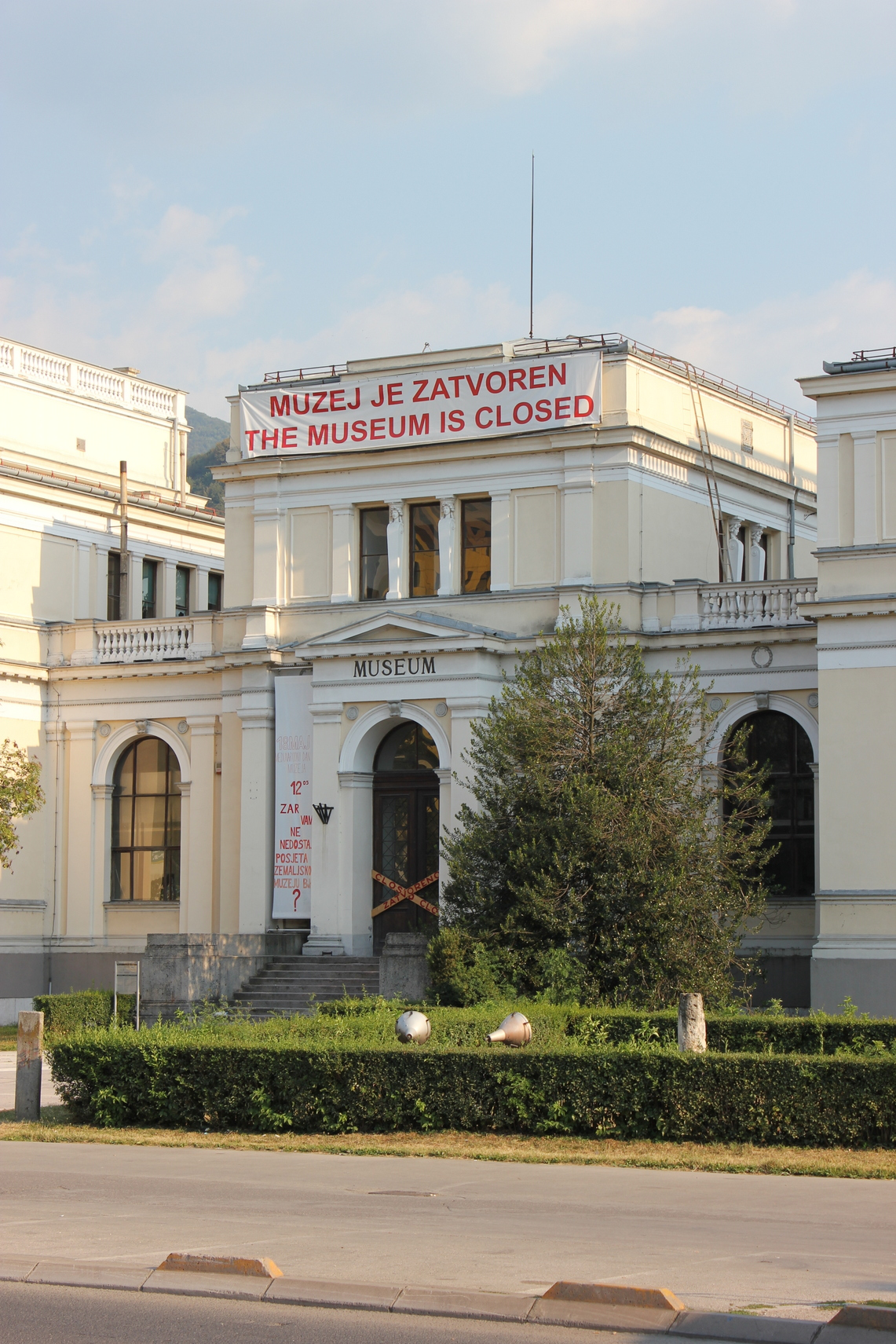 Das geschlossene bosnische Nationalmuseum in Sarajevo.Hornjoserbsce: Zawrjeny bosniski narodny muzej w Sarajewje.